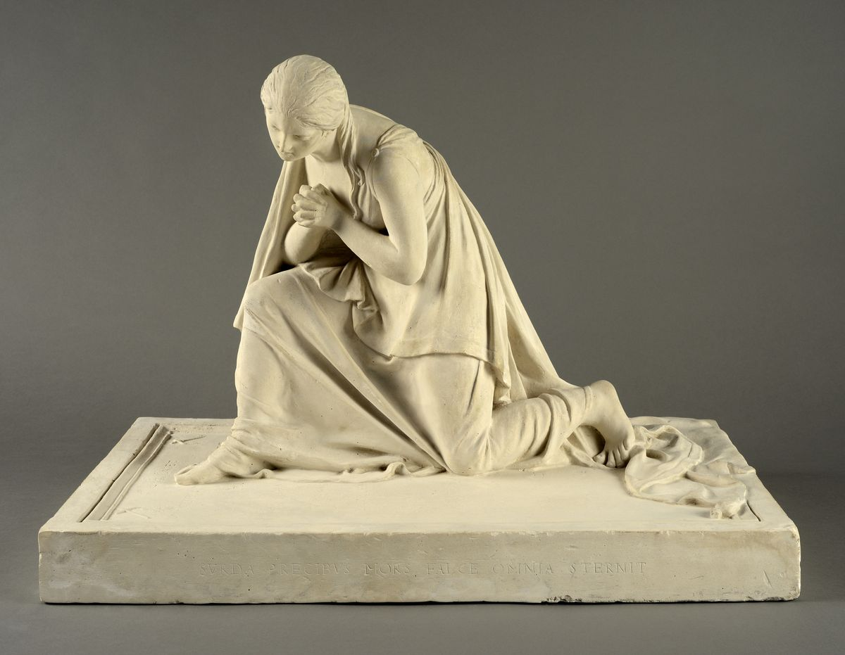 Figure funéraire vue de profil